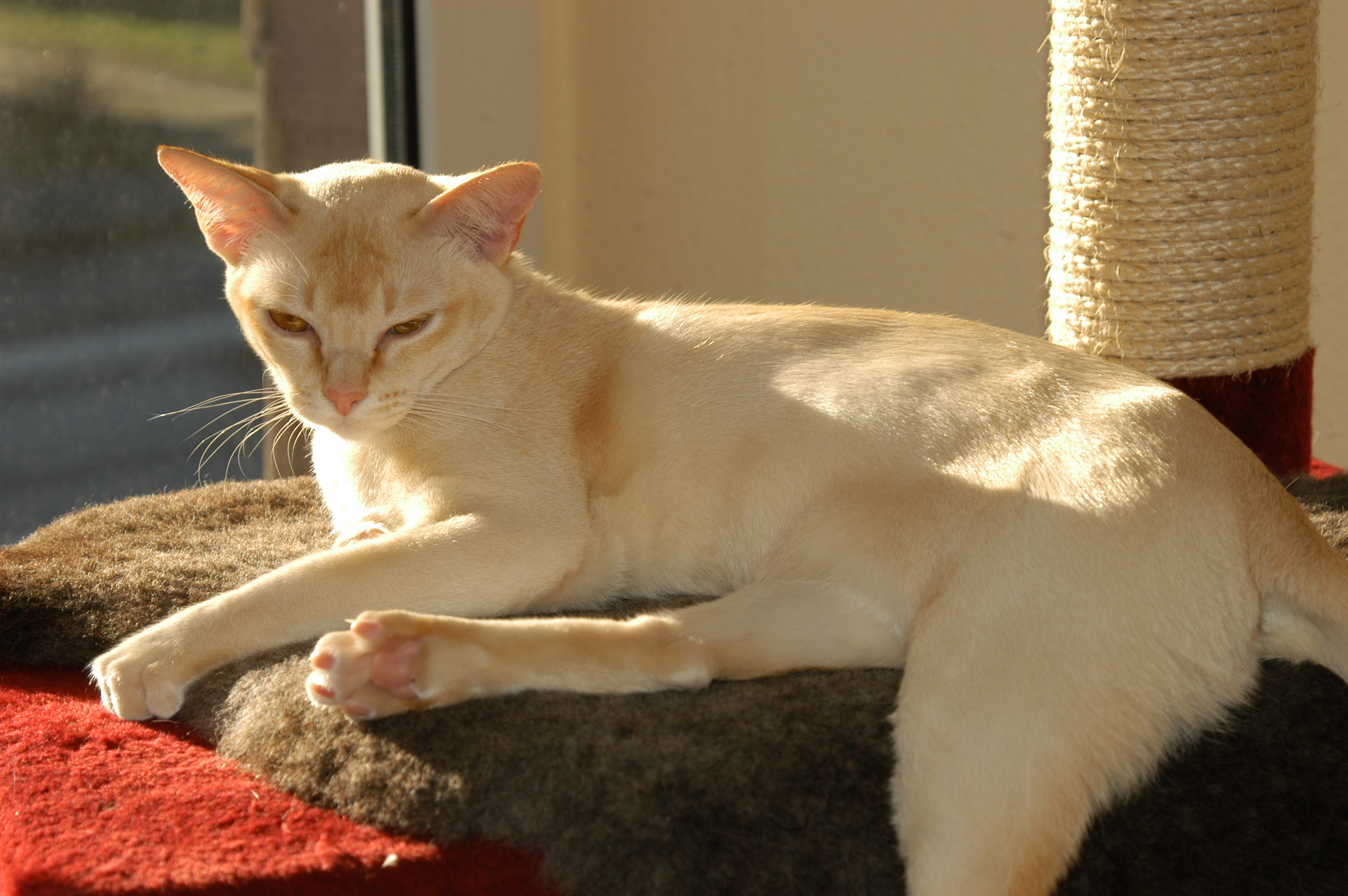 Maggie Burma rot